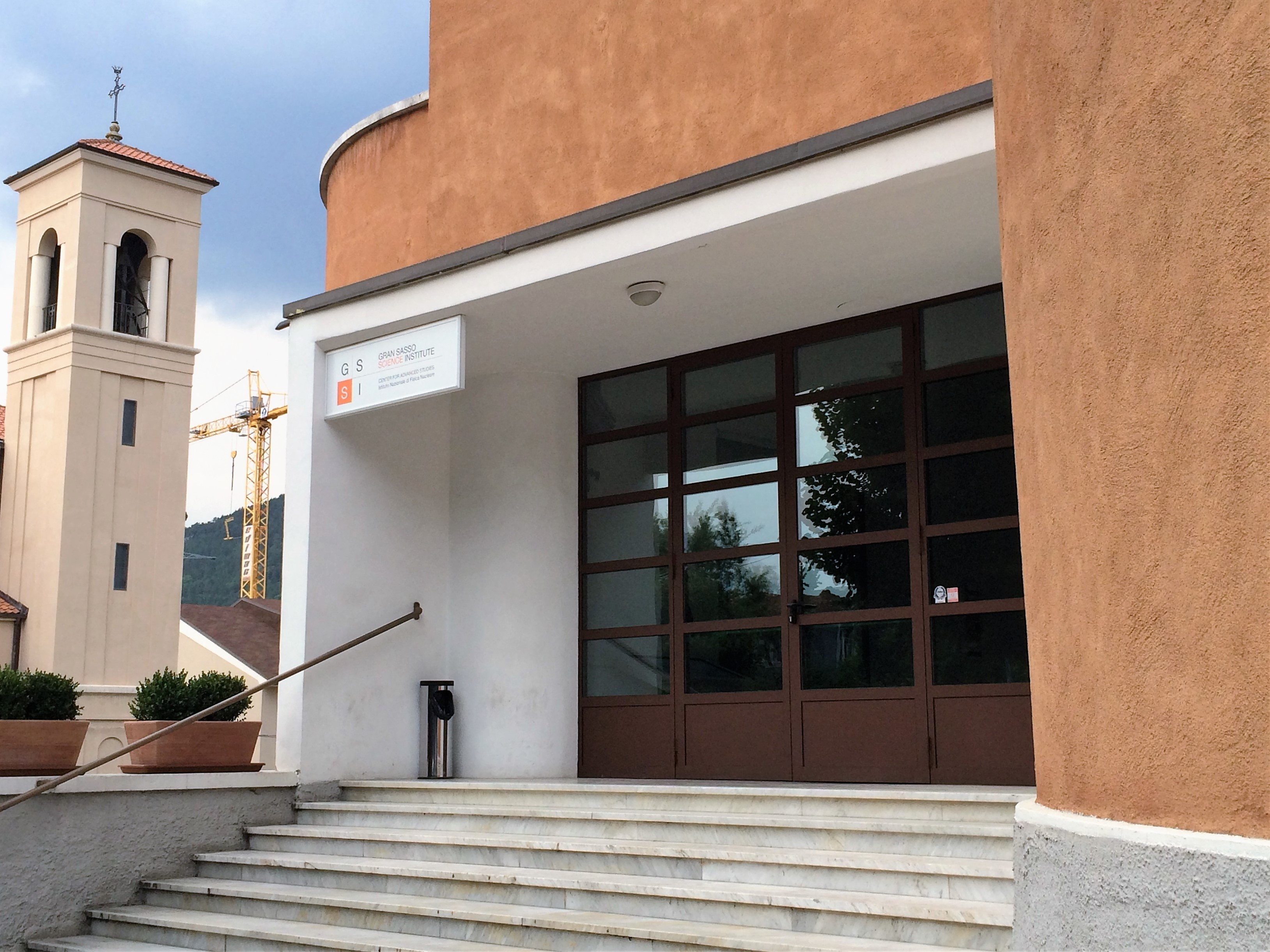 Ingresso alla sede del GSSI in viale Francesco Crispi.